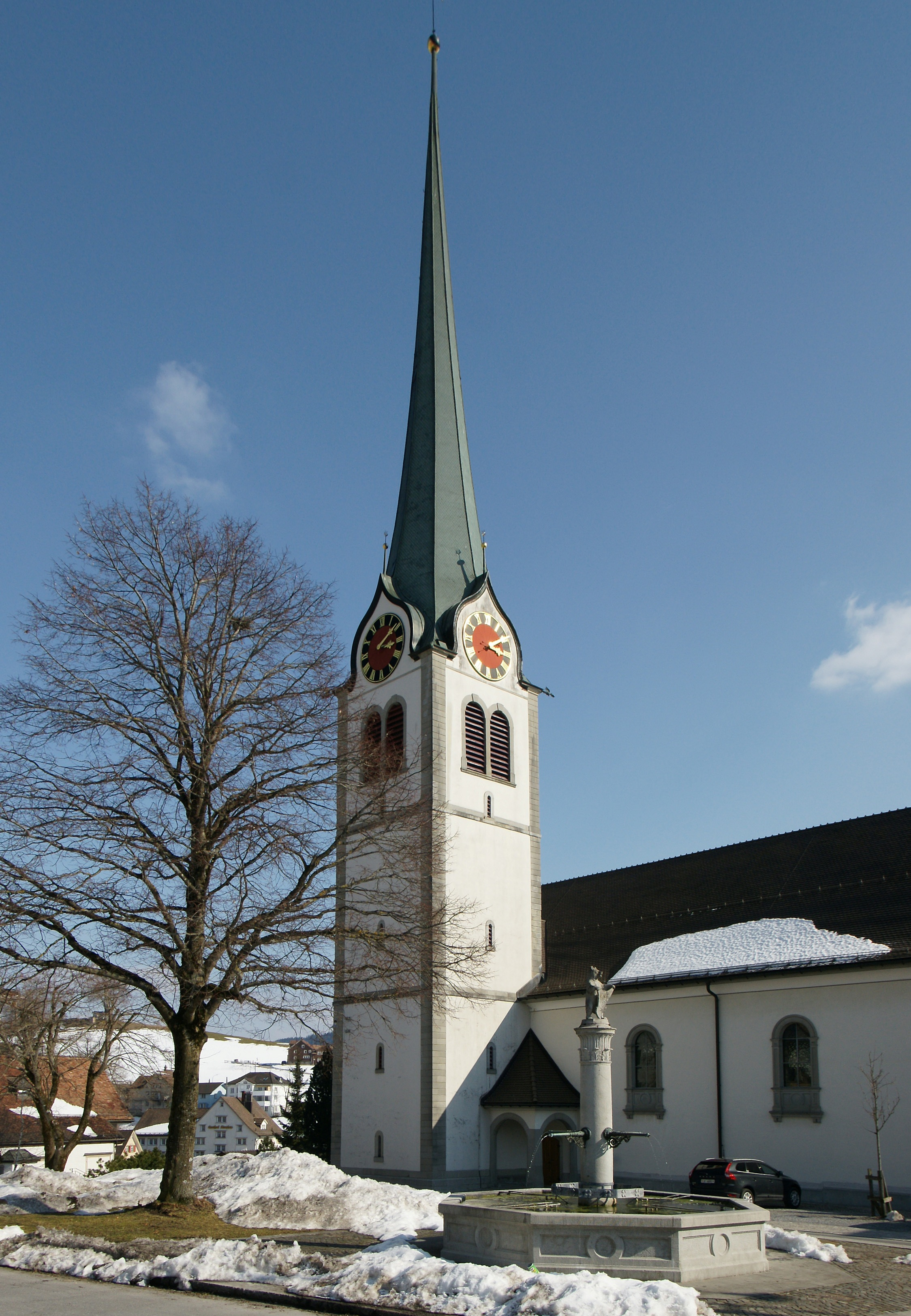 Evangelisch reformierten Kirche am Dorfplatz in Gais.